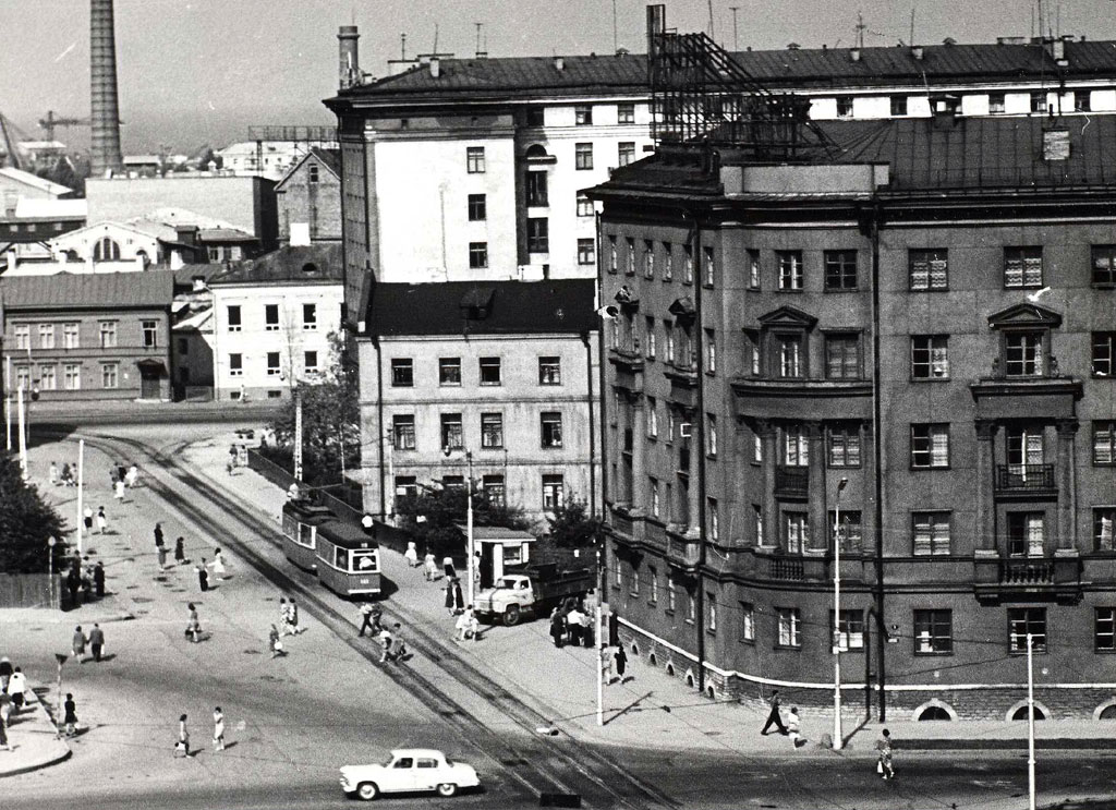 Ants Laikmaa tänav Tallinnas 1965. aastal.